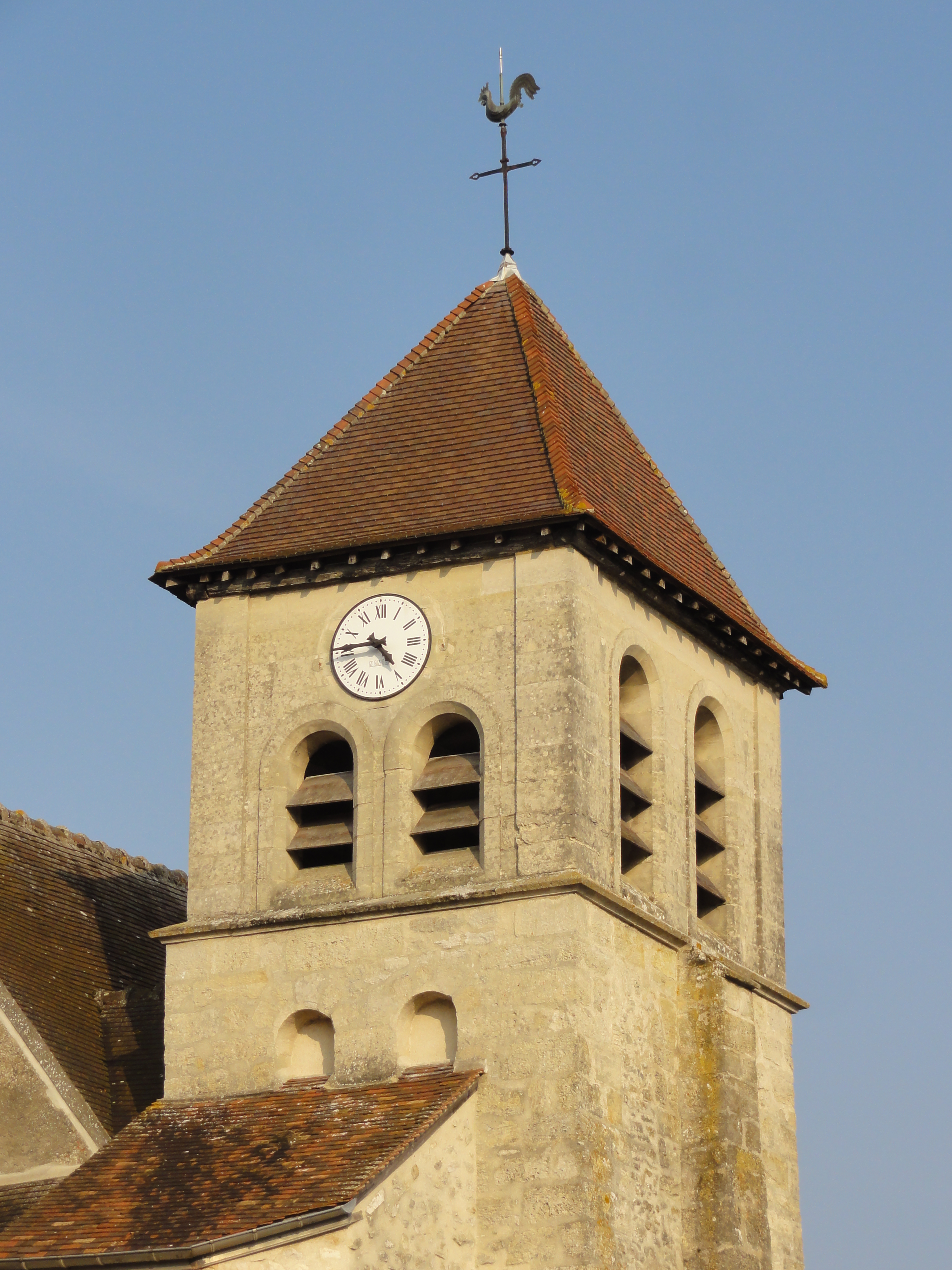 Clocher.